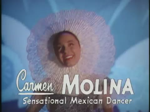 Imatges del tràiler de la pel·lícula "Los Tres Caballeros". Els tràilers de les pel·lícules publicats abans de 1964 als Estats Units es troben en domini públic